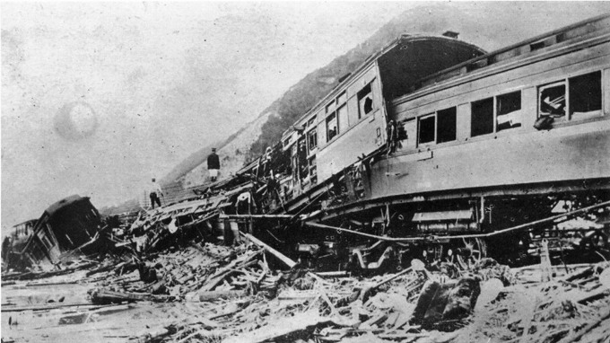 山陽本線安芸中野駅 - 海田市駅間で発生した特急列車脱線事故